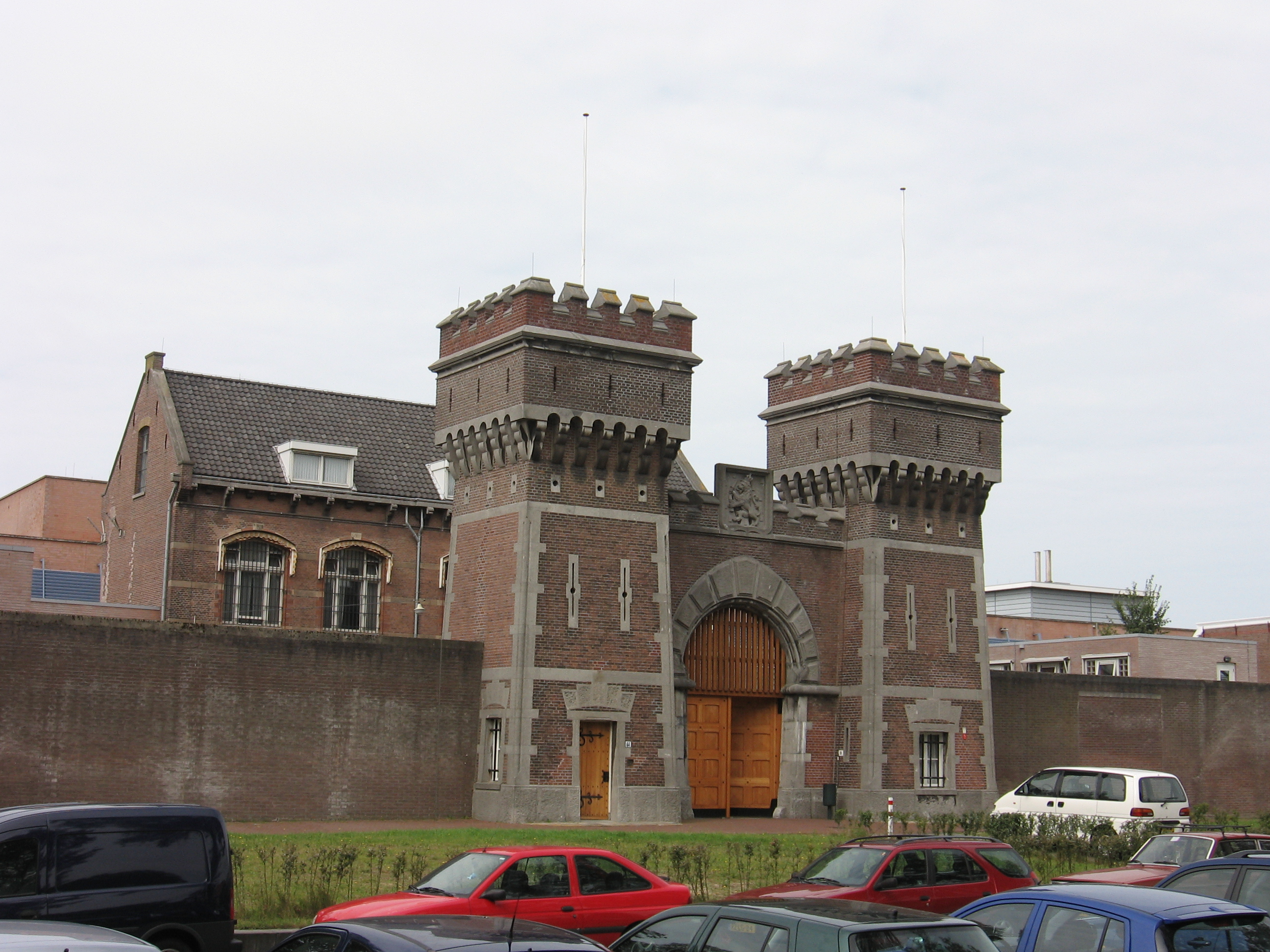 Eingang der Penitentiaire Inrichting Haaglanden im Den Haager Stadtteil Scheveningen, in der sich die United Nations Detention Unit befindet